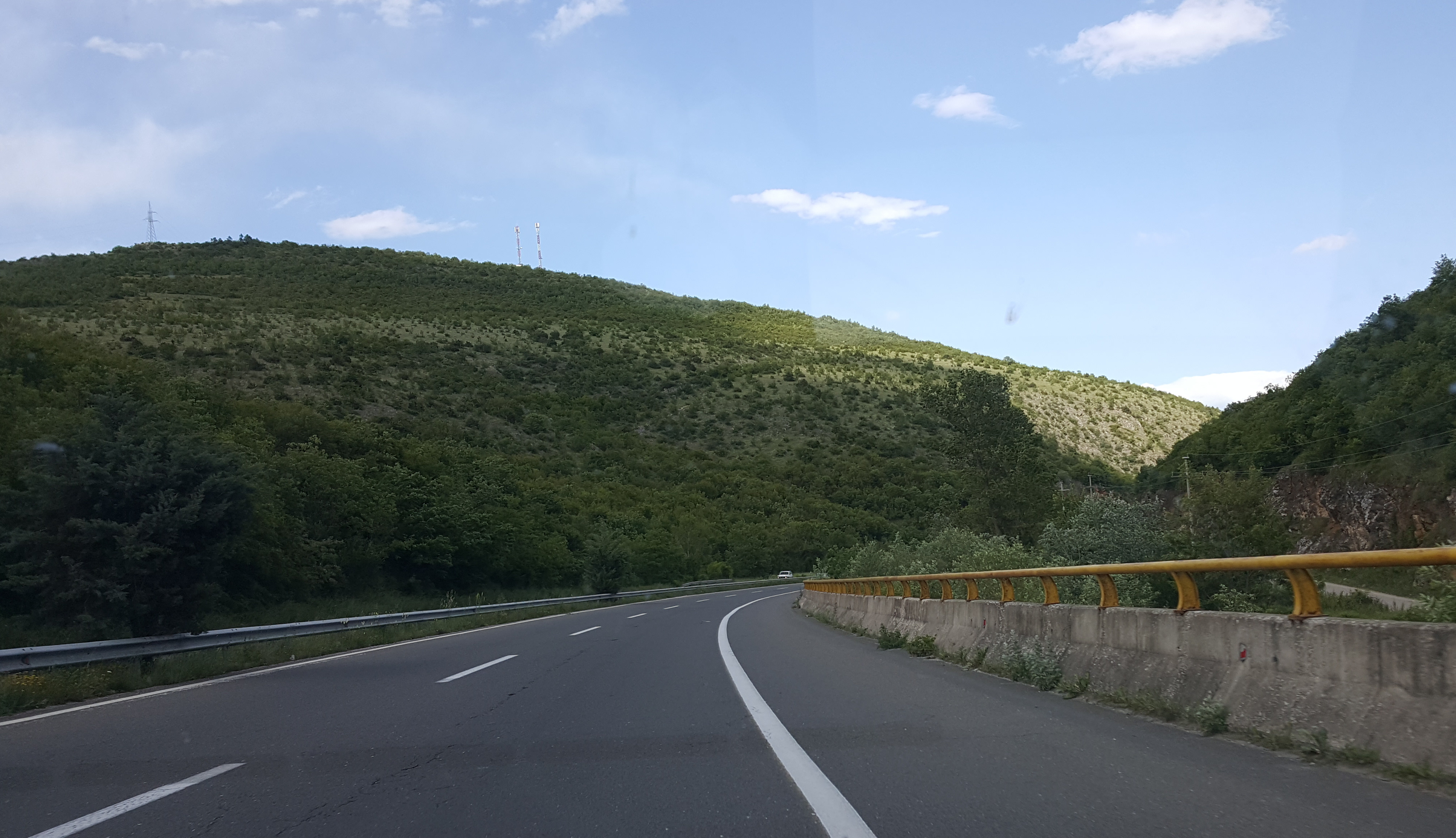 Месноста Карпалак на автопатот Тетово - Скопје